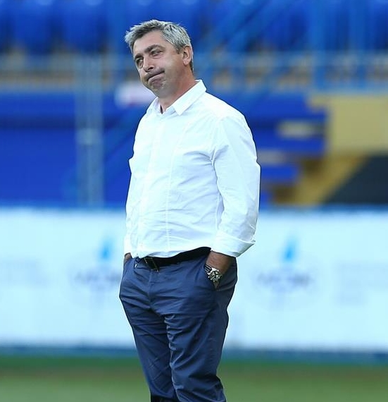 Александр Владимирович Севидов